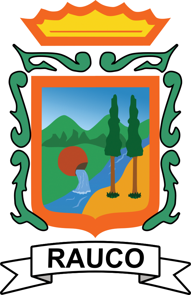 Escudo de Armas de la Comuna de Rauco (Provincia de Curicó, Región del Maule, Chile) Formalización de diseño aprobada mediante Decreto Alcaldicio N° 542/2018